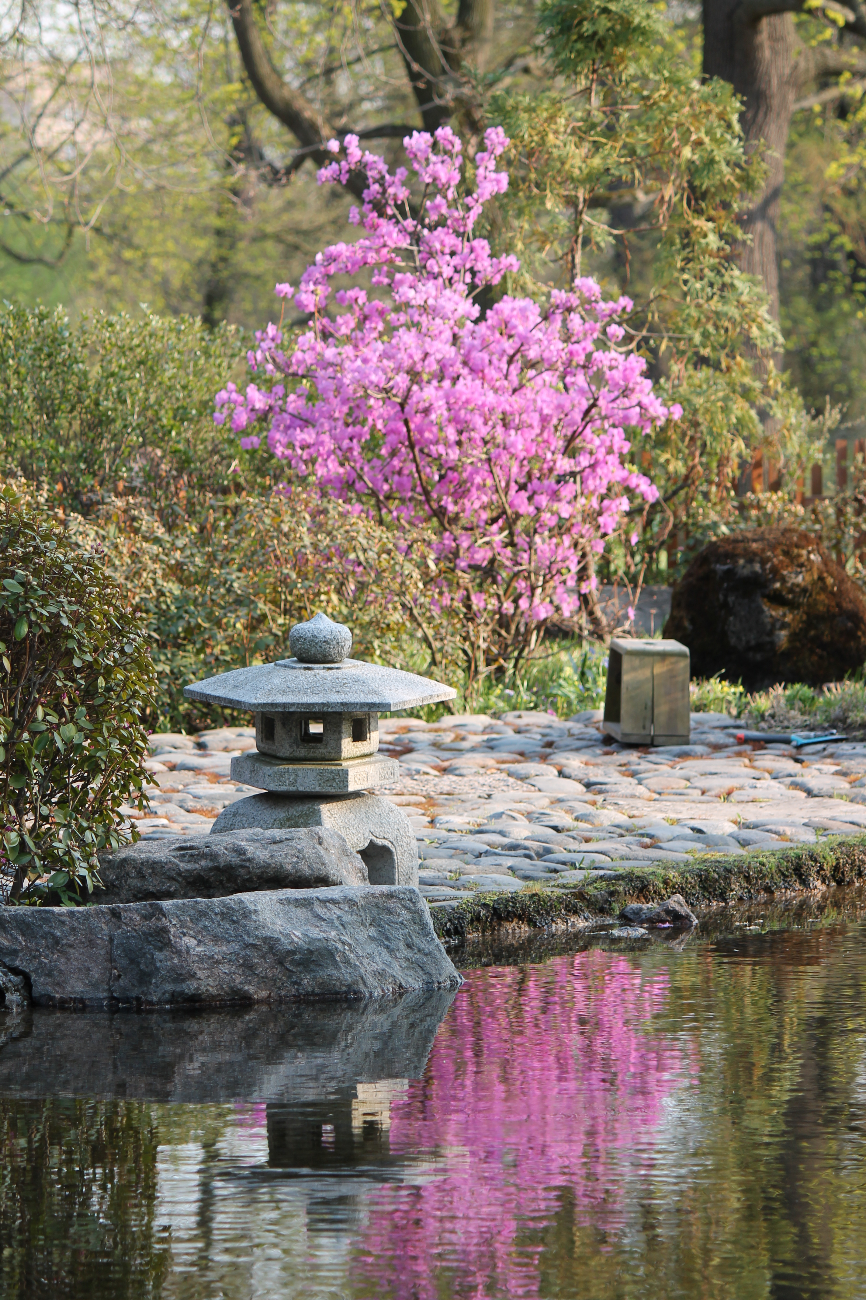 Ботанический сад ботанического института им. В.Л. Комарова РАН: между Аптекарской набережной, набережной реки Карповки, Аптекарским проспектом и улицей Профессора Попова, Петроградский район, Санкт-Петербург This image is related to the protected area of Russia number 7800036